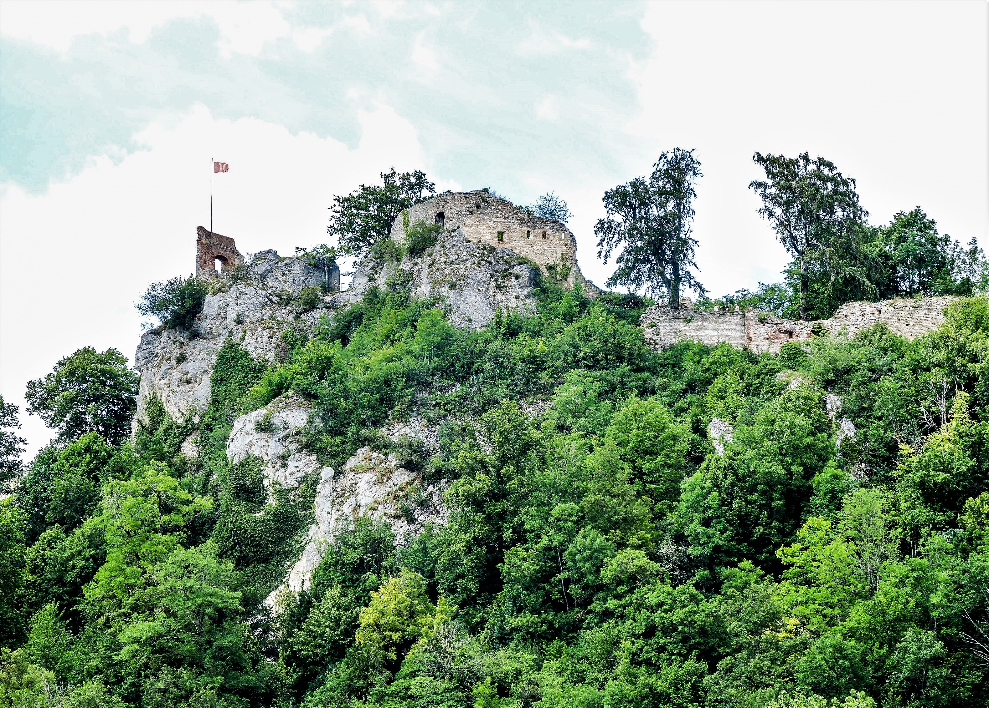 Ruines du château de Ferrette, vues de la route de Winkel